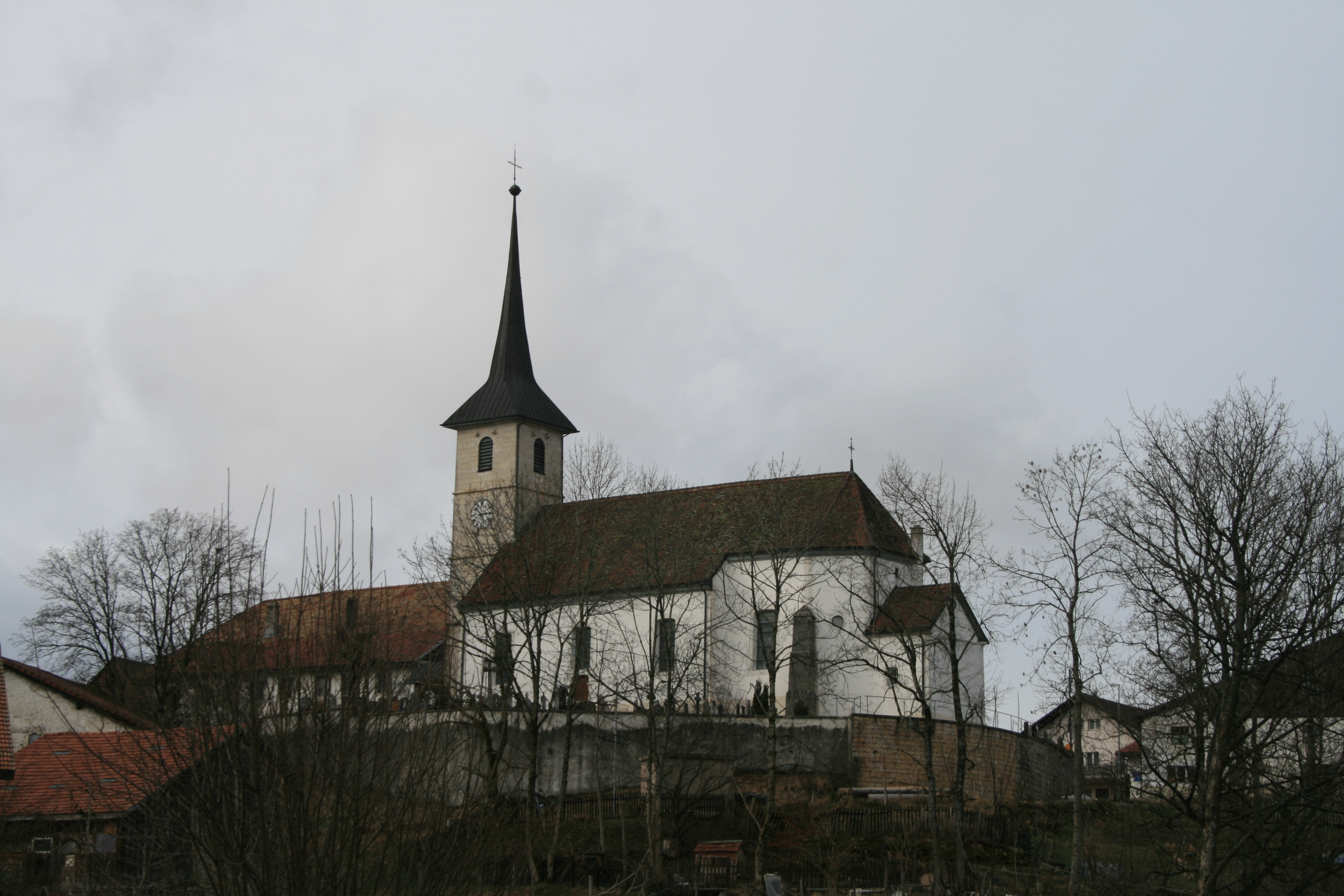 Kirche von Saint-Brais JU